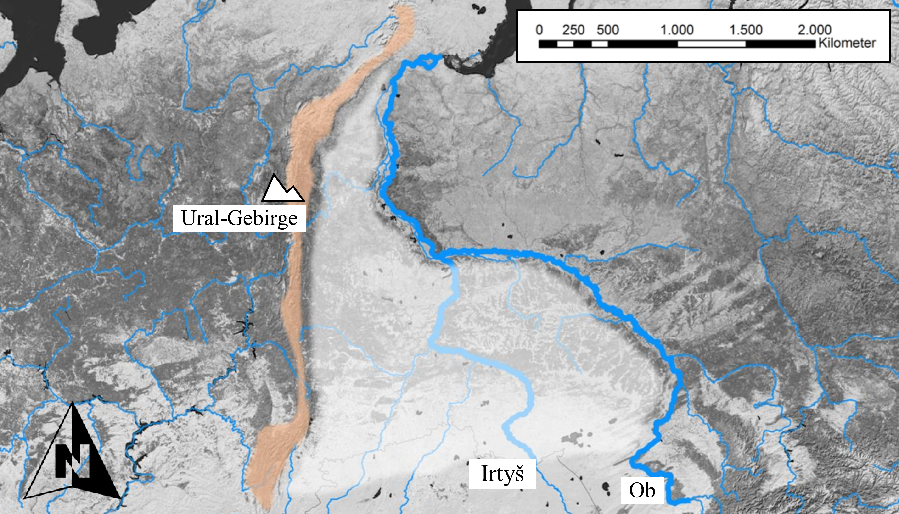 Urheimat des ungarischen Volks (Magyaren)